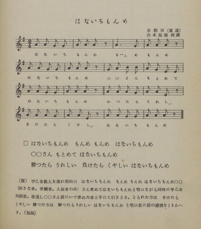 はないちもんめの歌詞（広島高等師範学校附属小学校音楽研究部編集 続日本童謡民謡曲集 p.65）